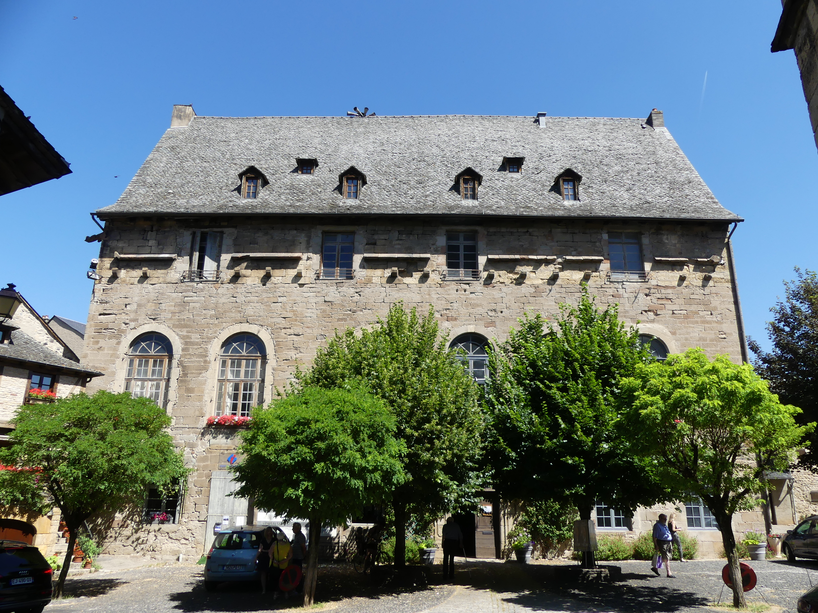 L'hôtel de ville (ancien château) de Saint-Côme-d'Olt, Aveyron France. La façade sud.